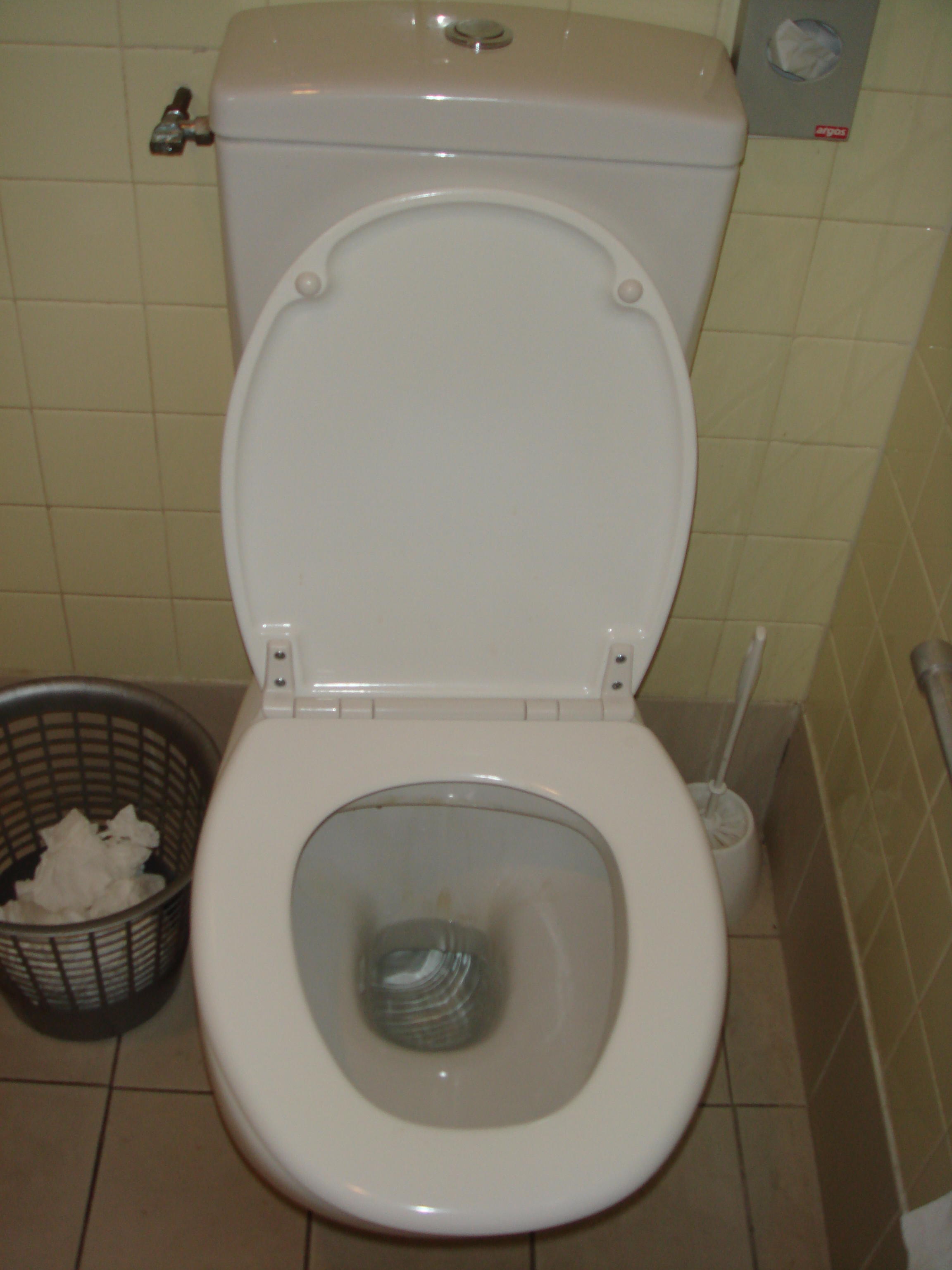 Une toilette